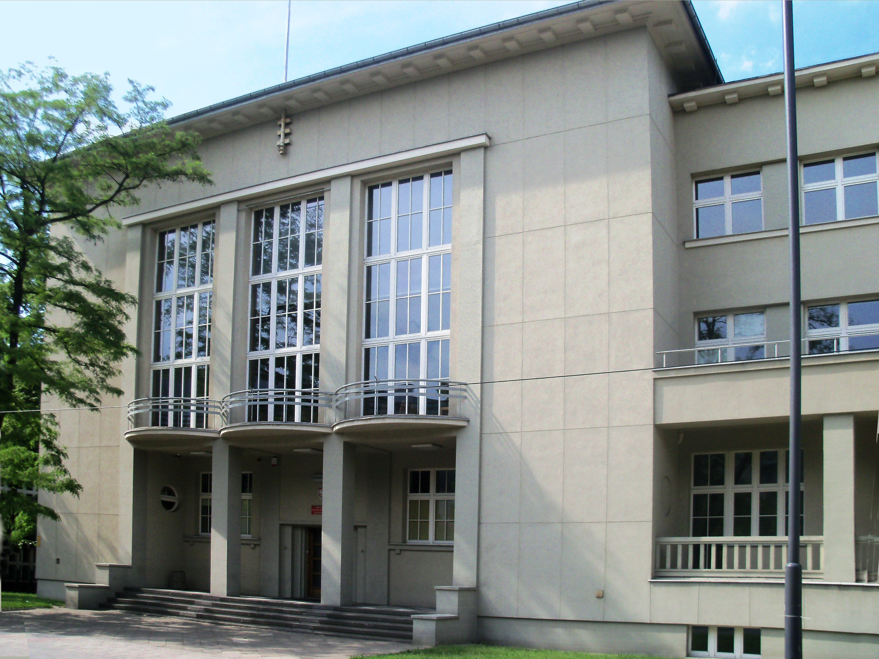 Budynek katowickiej Akademii Sztuk Pięknych (ul. Raciborska 37) − w okresie międzywojennym w jej budynku mieściło się kasyno oficerskie, budynek został wpisany do rejestru zabytków (nr rej.: A/1434/91 z 5 września 1991), wzniesiony około 1930 według projektu L. Sikorskiego w stylu modernizmu.